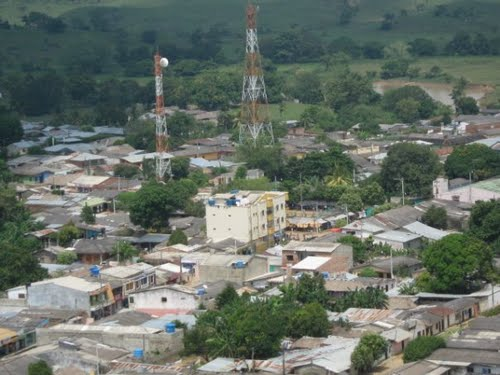 vista aérea